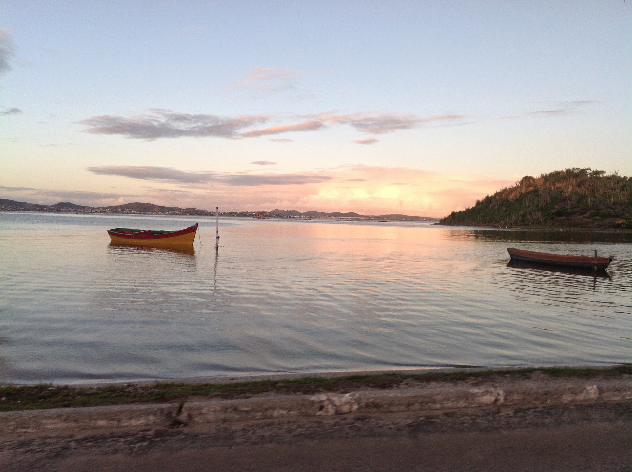 Boqueirão, São Pedro da Aldeia - RJ, Brazil